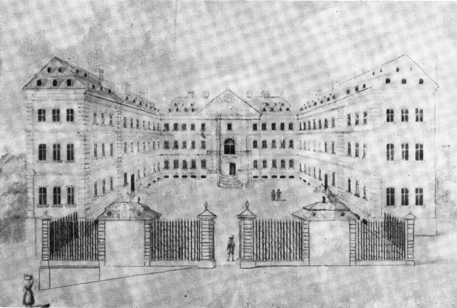 Schloss Gaugrehweiler. Wild- und Rheingraf Carl Maguns von Grumbach übernahm 1740 die Herrschaft nach dem Tode seines Vaters als 22jähriger und begann 1748 mit der Erbauung dieses großen Schlosses im Stile Versailles, das schließlich 180 tausend Gulden verschlang. Er gab hier glänzende Feste. Zu seinem Hofstaat gehörten Hofkavaliere und Hoffräulein, Husaren, Haiducken, Mohren und Hofmusikanten. Das Kleinod des Grehweiler Hofes war aber der große Marstall von 120 Pferden. Der Bauherr war total verschuldet und wurde in Wien wegen Betrug angeklart. Kaiser Josef II. verurteilte ihn 1775 zu zehn Jahren Haft in Königstein/Taunus. Er starb verarmt im Schloss, hatte zuletzt nur ein Pferd. Der Bauherr hatte keine männlichen Nachkommen. Seine Linie starb mit ihn aus. Die Französische Revolutionsarmee übernahmen nicht nur seine Grafschaft. Schloss wurde nach seinem Tod zum Abriss versteigt. Selbst die Fundamente blieben nur stellenweise übrig. Auf diesen Restfundamenten wurde später das Dorfgemeinschafthaus gebaut. Schloss Gaugrehweiler, Federzeichnung, 18. Jh., Hist. Mus. d. Pfalz, Speyer